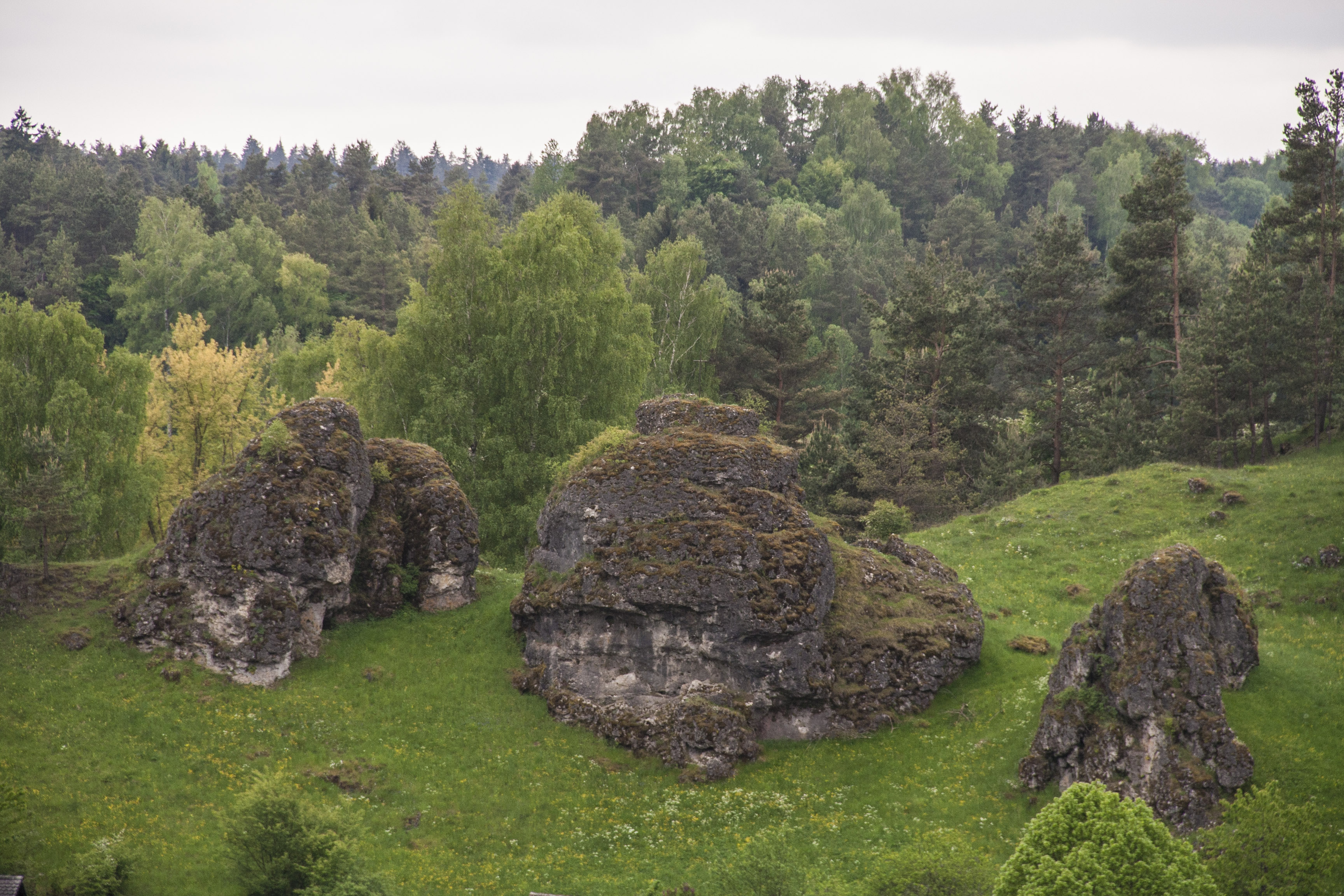 Huberfelsen, Alfeld, Geotop